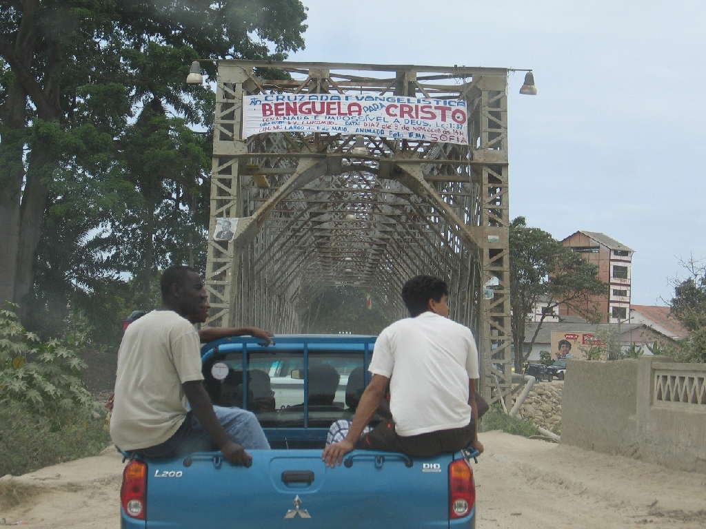 Brücke in Catumbela, Benguela Provinz, Angola